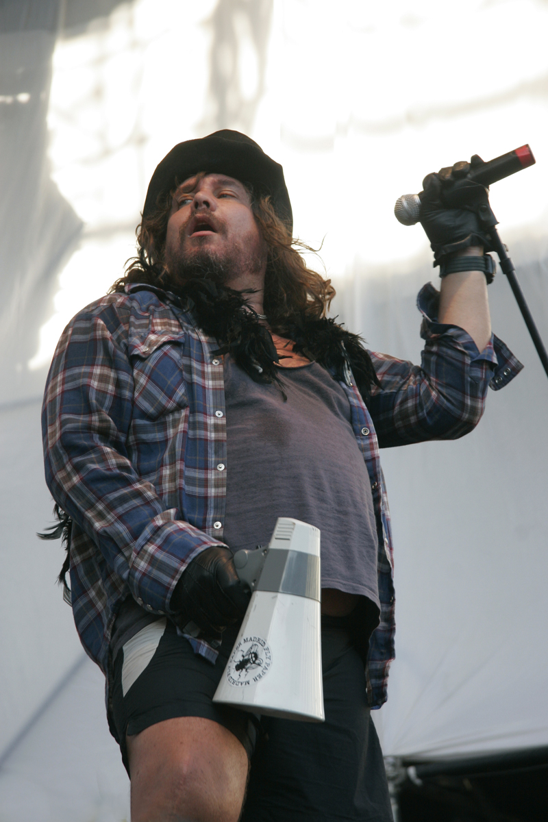 Formada a mediados de los 80, Masacre fue la banda pionera del skate rock en Argentina y el resto de Latinoamérica. ( Foto: Estrella Herrera) Cuando el punk comienza a ganar la escena underground de Buenos Aires, la banda apareció con su ya mítico nombre. Su líder Walas, un frontman tan poderoso como irreverente y sincero. ( Foto: Estrella Herrera)